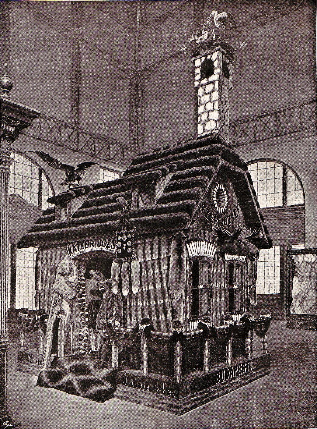 Pelzhaus. Bildunterschrift: Ausstellungsobjekt der Milleniums-Ausstellung in Budapest 1896. Entworfen und ausgeführt von der Firme JOSEF KATZER, Budapest. - Diese originelle Arbeit, die seiner Zeit in allen Fachkreisen lobende Anerkennung gefunden hat, zeigt ein „Alfölder Bauernhaus“ dessen äussere und innere Bekleidung aus nur naturellem Pelzwerk zusammengestellt ist. Der steinartige Sockel aus naturellem Seehund ruht auf einem Unterbau mit Suslikfellen verkleidet. Grundmauern und Fensterverschläge sind aus Maulwurf. Die Hauptwände sind Posten aus Biesamwammen; auf den Pfosten sind Igel als Abschlüsse angebracht, die Fehschweifboas im Maul halten, Fenster und Thürvorsprünge aus Fehwammen. Die Giebelwände aus n. Seehund. Die vier Ecken des Hauses zieren vier verschiedene Fuchsfelle. Das Dach besteht aus austr. Opossumschwänzen die schindelartig übereinander liegen; der Schornstein aus Grebesfellen und auf demselben ein Storchennest. Auf dem entgegengesetzten Giebel breitet ein bosnischer Steinadler seine Flügel aus. Am Eingange des Hauses steht ein brauner Bär, auf einer Standarte die Ehrenzeichen der Firma haltend. Im Innern des Hauses waren die eigentlichen Kürschnerarbeiten der Firma ausgestellt.